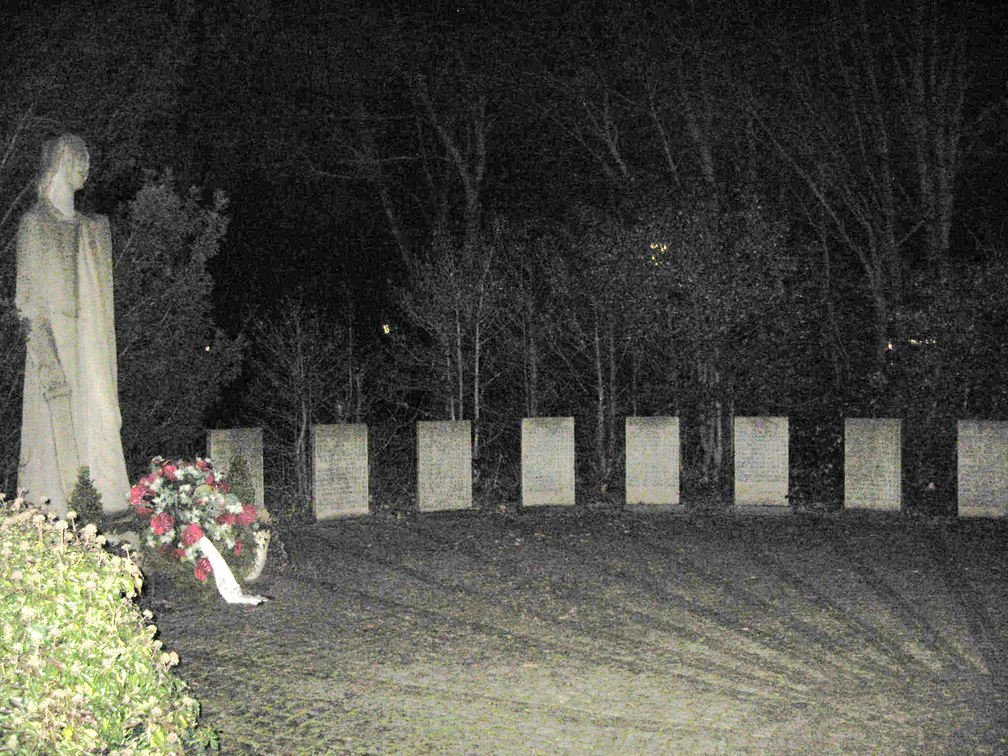 Gedenkstätte in Bramsche (Lingen), Gleesener Straße, Bramscher Kirche Breitengrad: 52.456333 (52° 27' 22.80 N) Längengrad: 7.365099 (7° 21' 54.36 E)